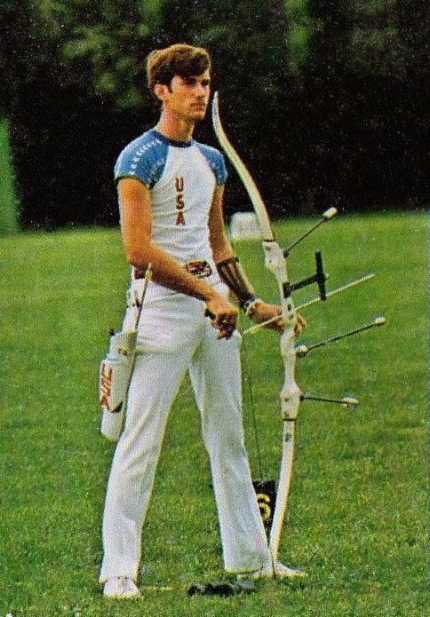 CAMPIONI dello SPORT 1973/74-Figurina n.400- WILLIAMS - TIRO CON L'ARCO -Rec